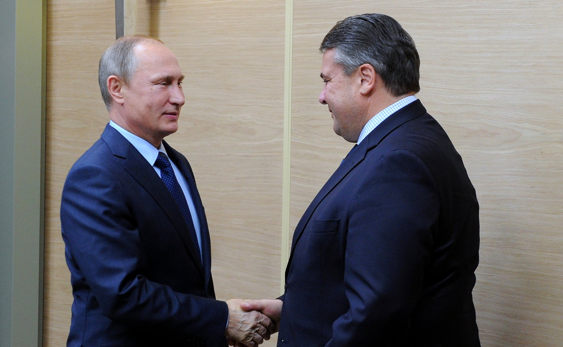 Встреча президента России Владимира Путина с вице-канцлером, министром экономики и энергетики Федеративной Республики Германия Зигмаром Габриэлем